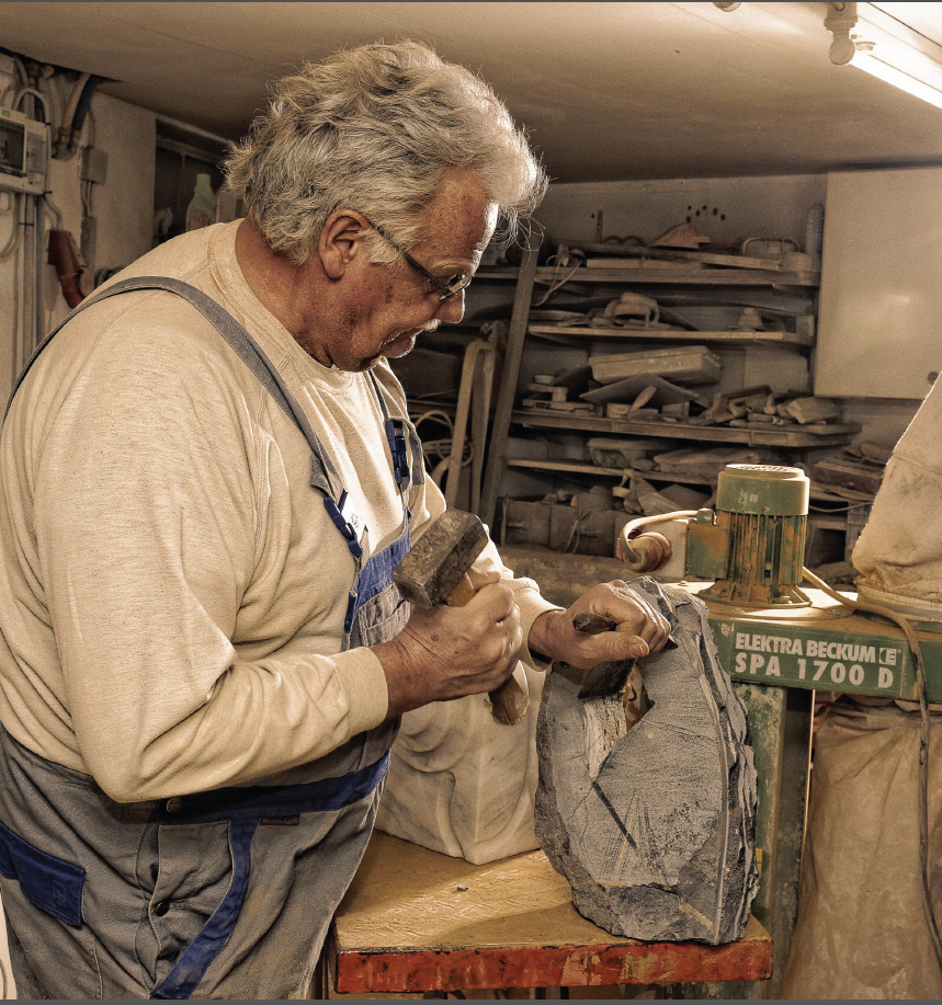 de Sculpteur bei der Aarbecht